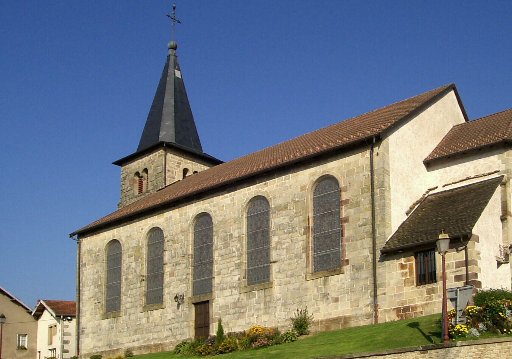 L'église Saint-Jacques du Stat à La Chapelle-aux-Bois